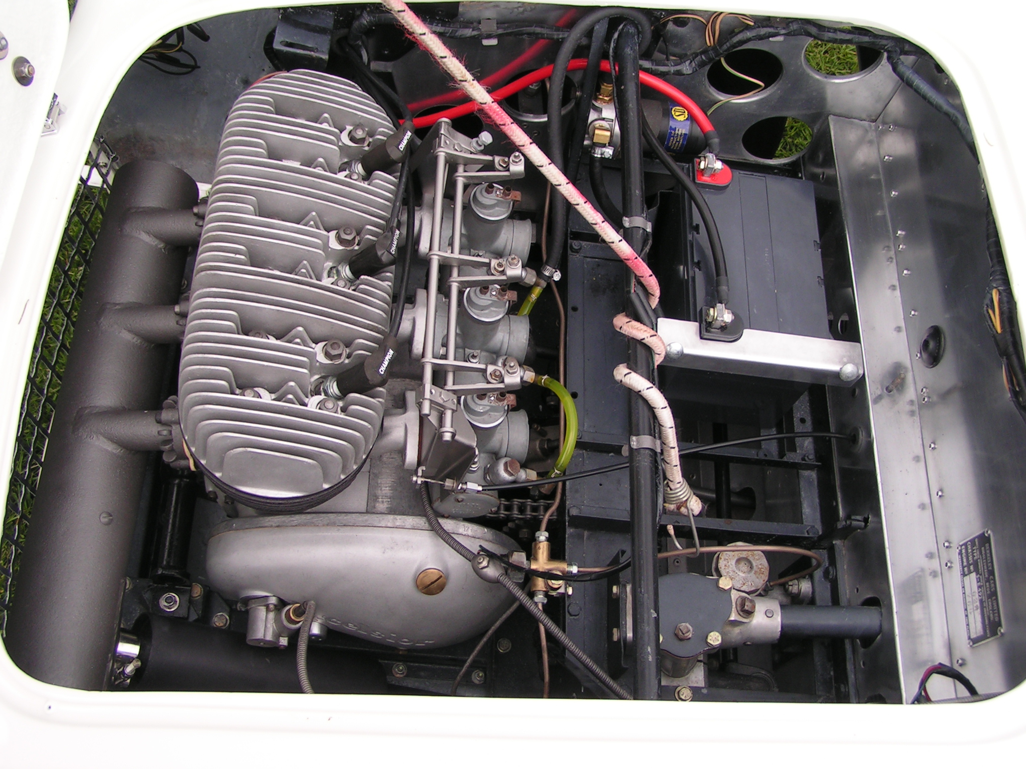 1959 Berkeley SE492 Engine